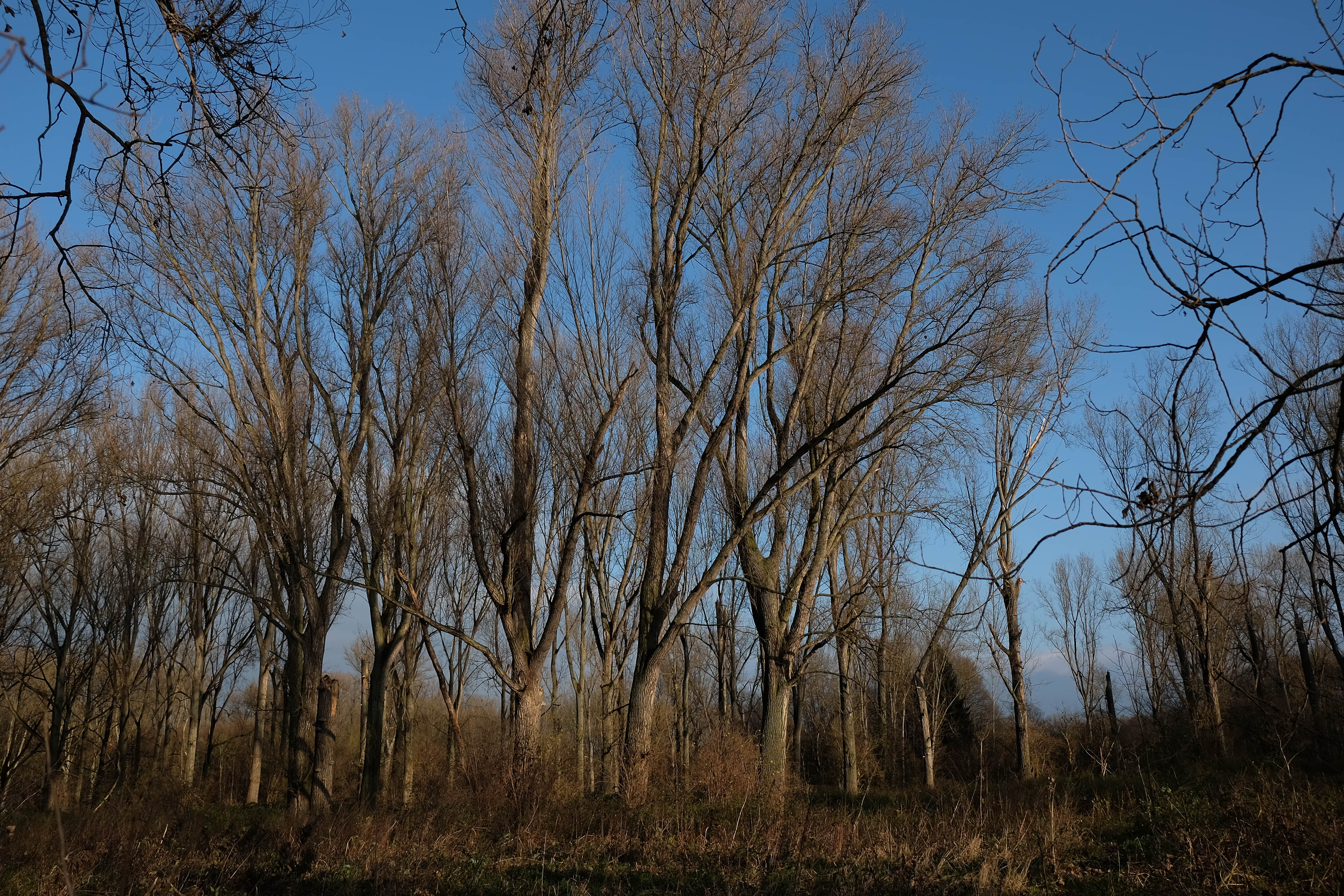 im dichten Auewald der Sieg kommt nur im Winter die Sonne durch.